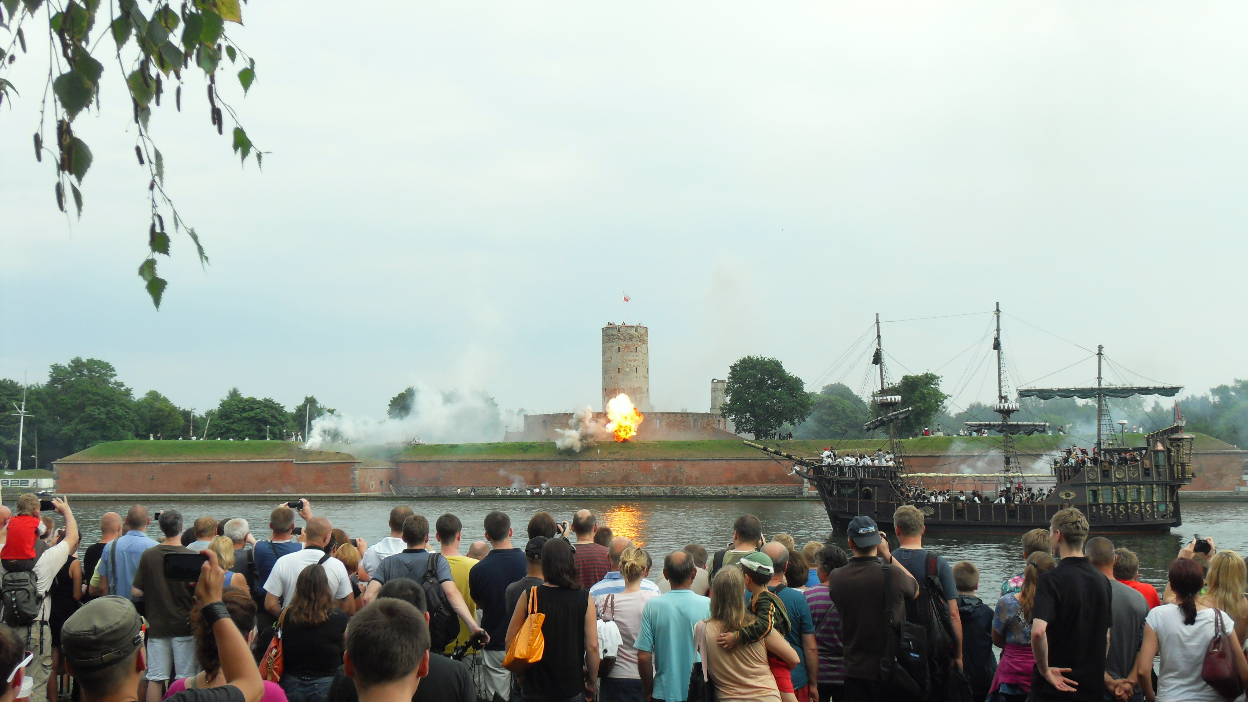 Gdańsk, inscenizacja: "Bitwa morska. Oblężenie Twierdzy Wisłoujście", Martwa Wisła.